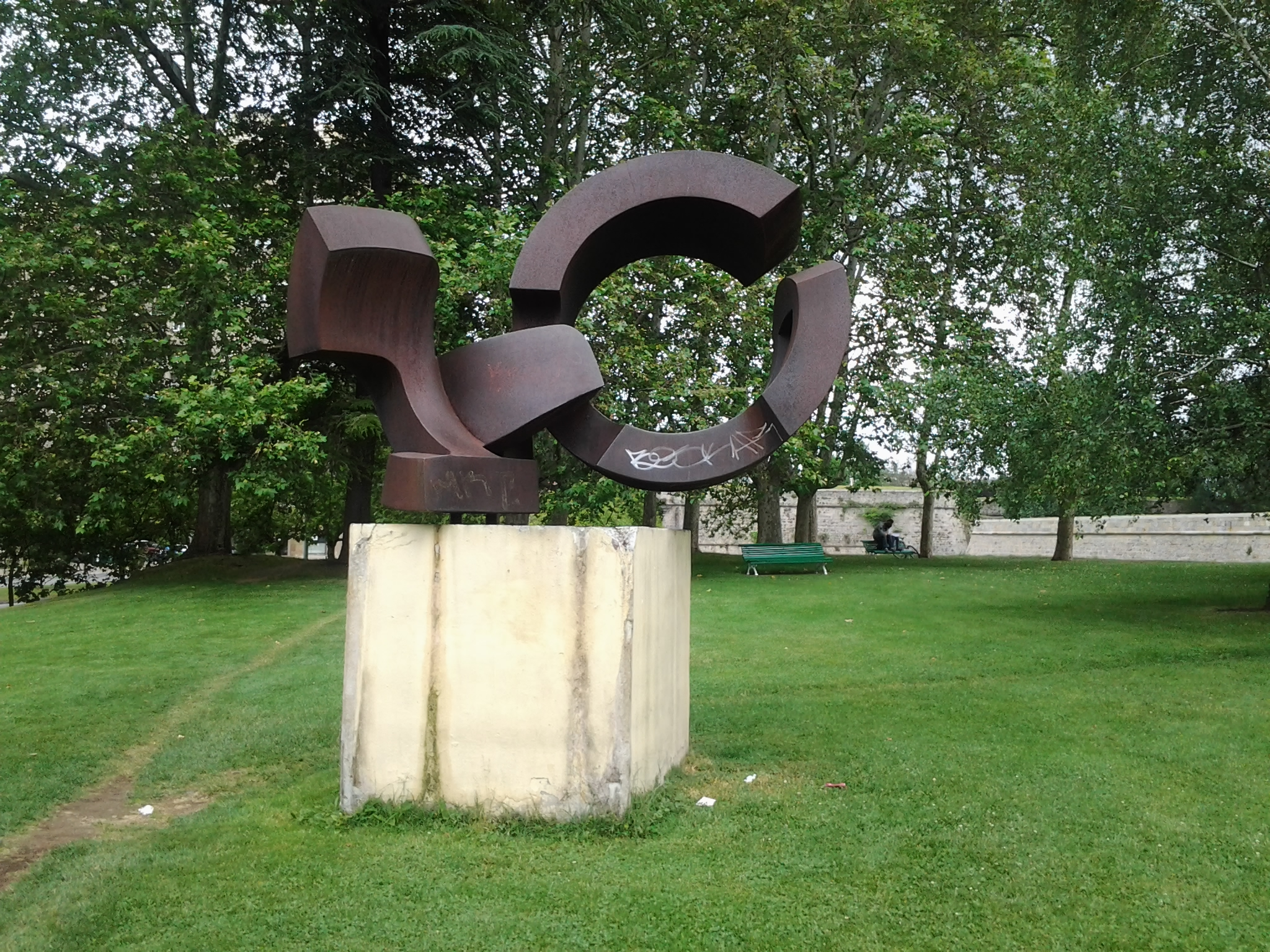 Escultura en un parque de Pamplona